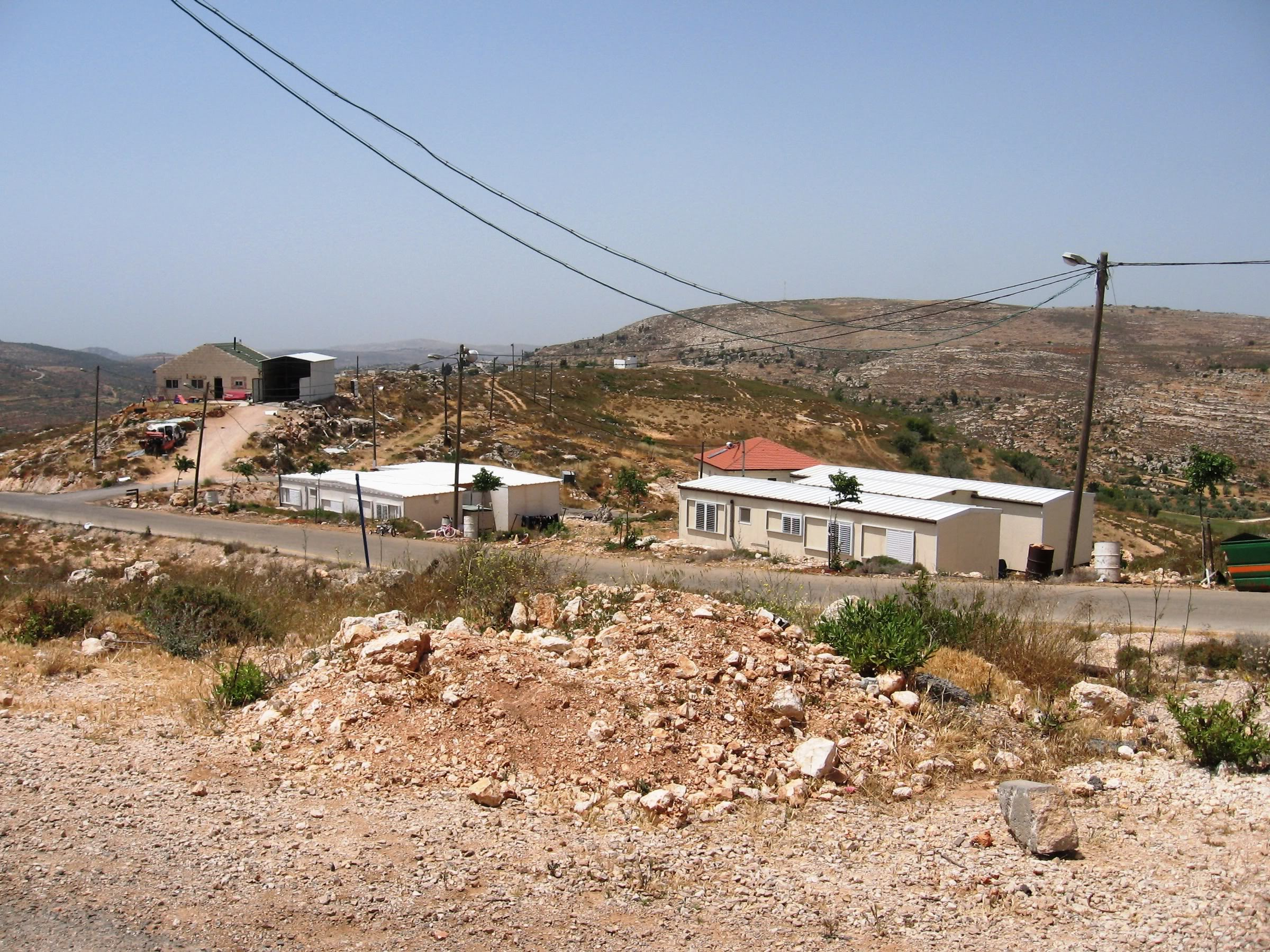 אחיה בגוש שילה